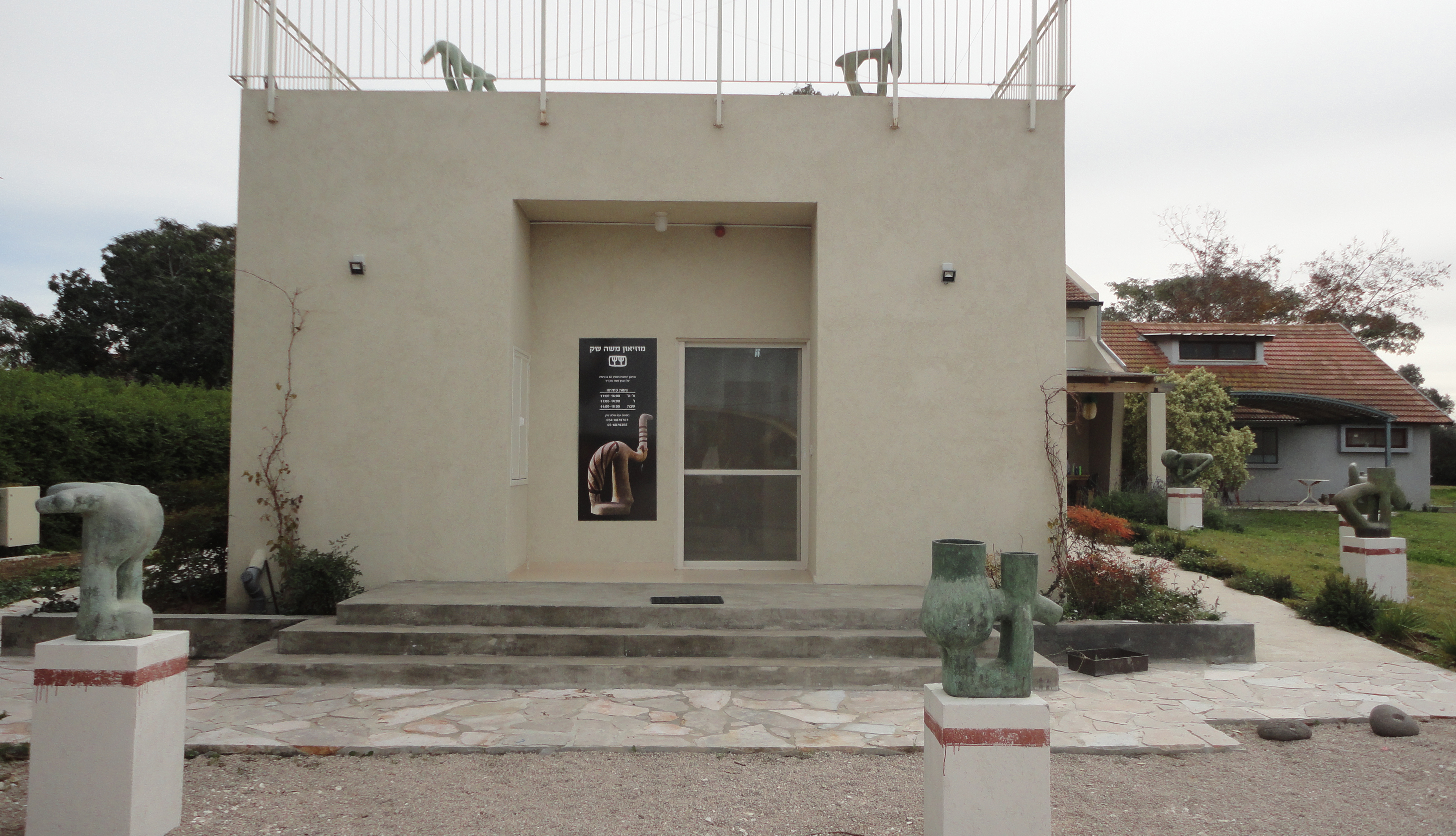 מוזיאון משה שק, קיבוץ בית ניר